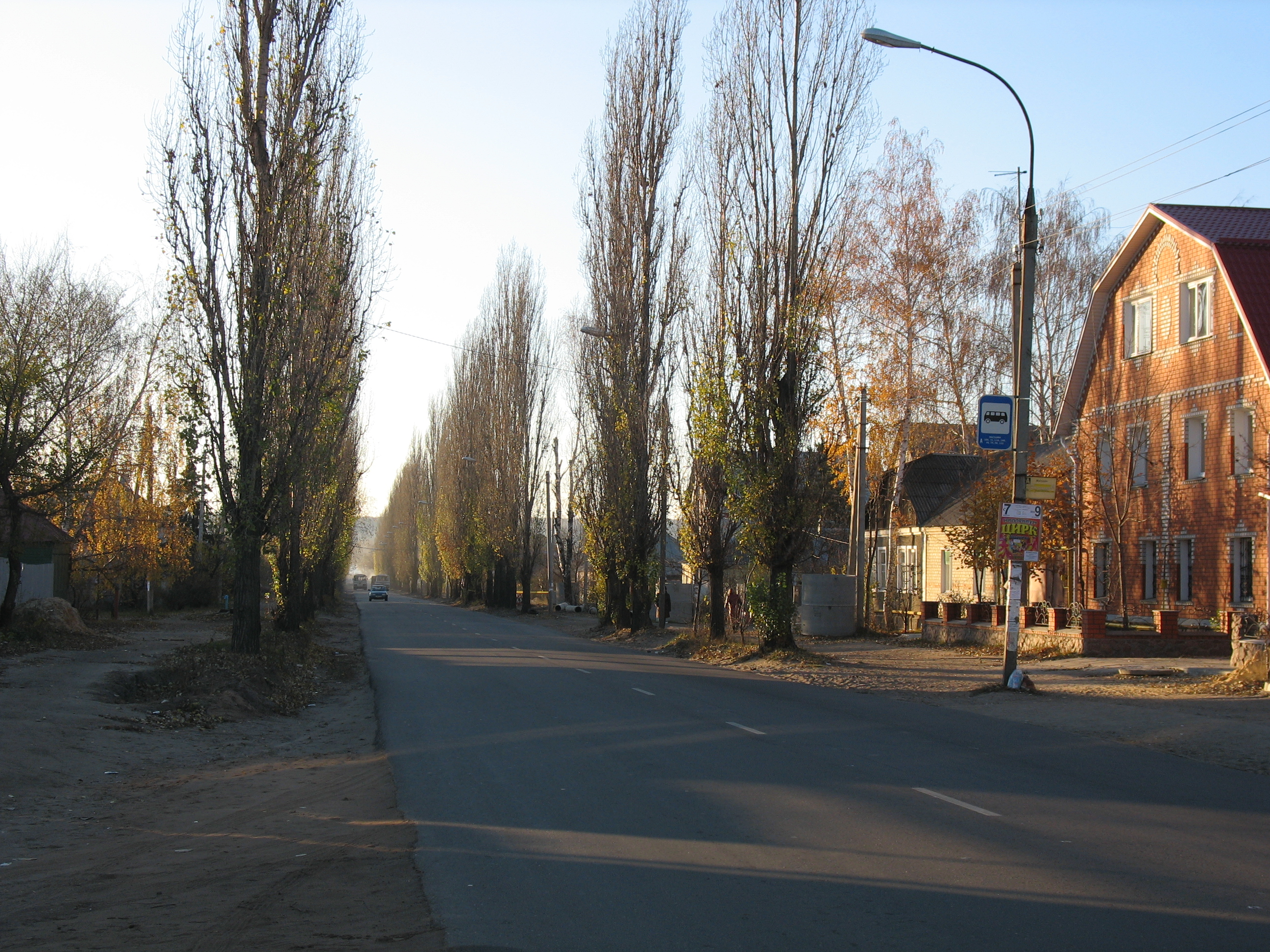 Улица Калининградская (Воронеж, Отрожка)